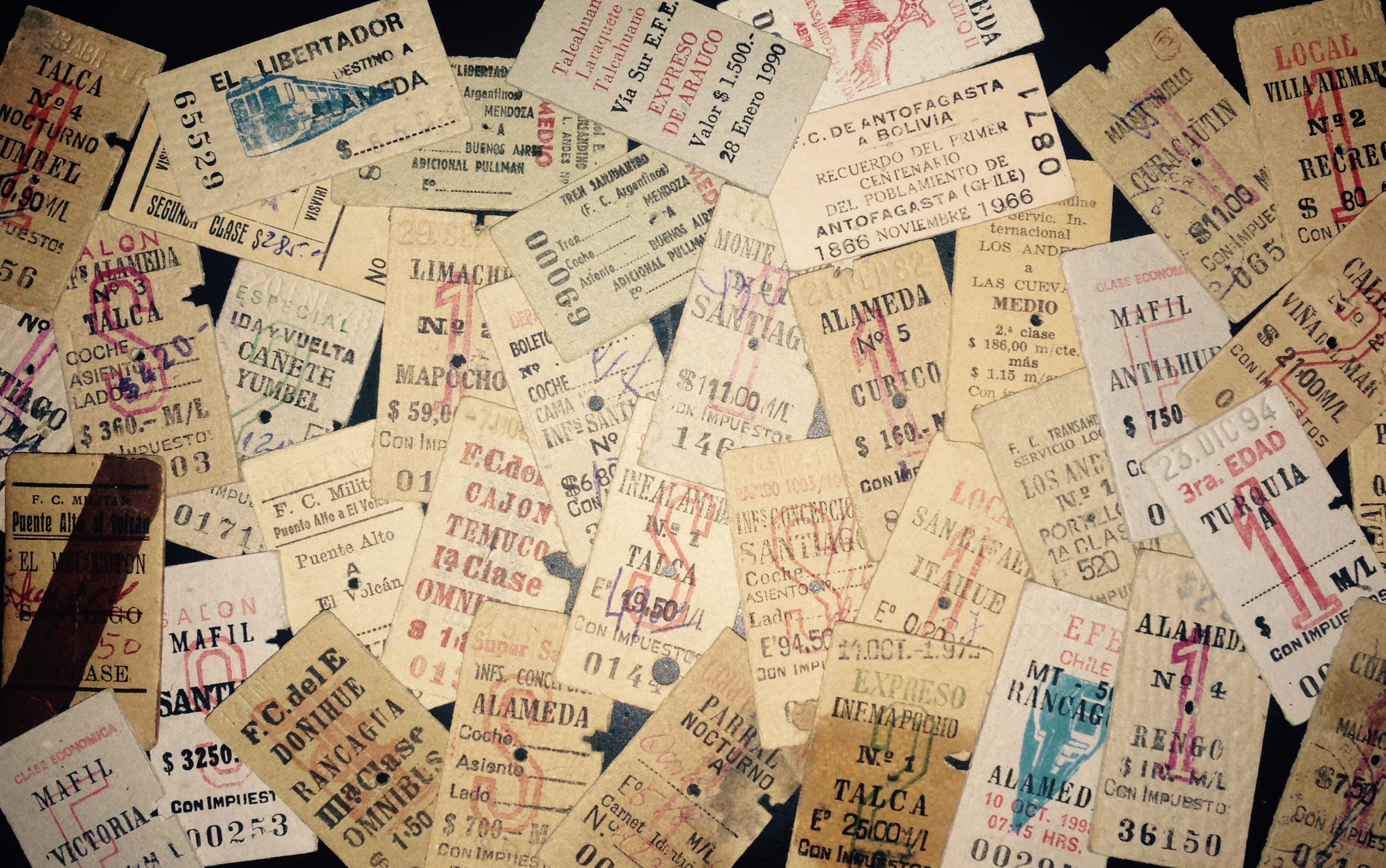 Cientos de historias en un pequeño trozo de cartón. Extracto de mi colección personal.